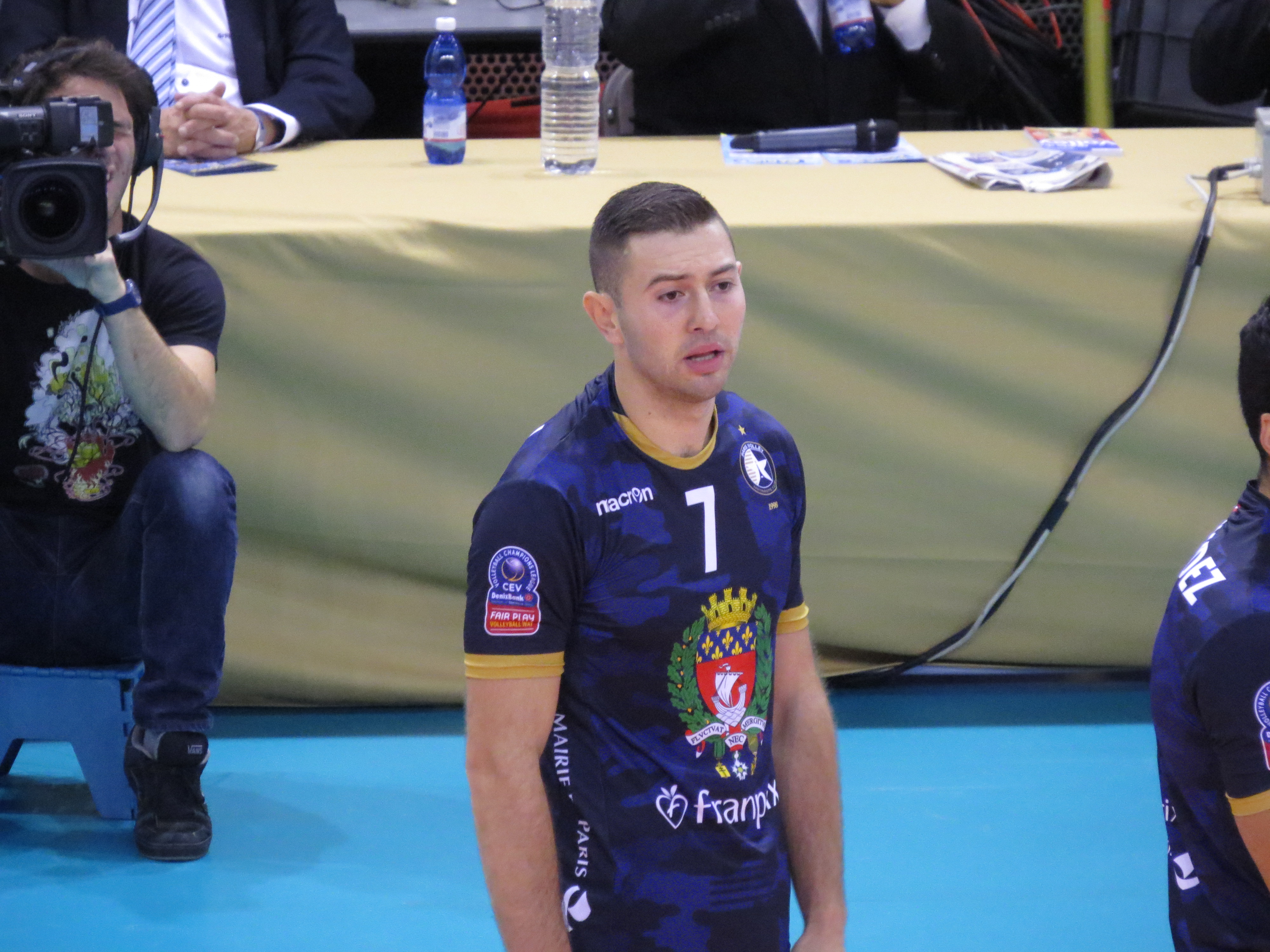 Paris 2 - TVB 3 Supercoupe 2014 de Volley N°7:GJORGIEV Nikola